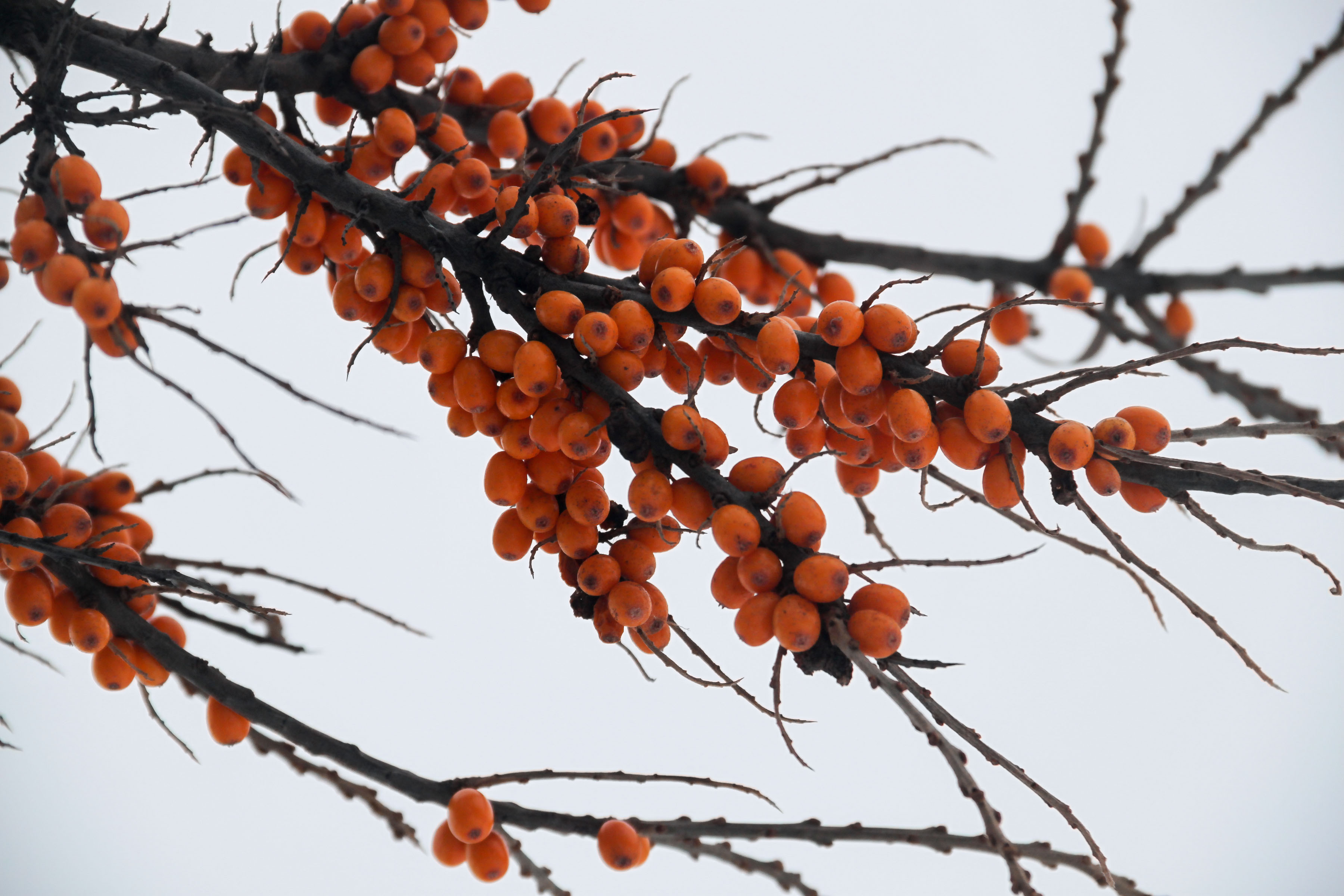 Плоды облепихи на ветках в ноябре